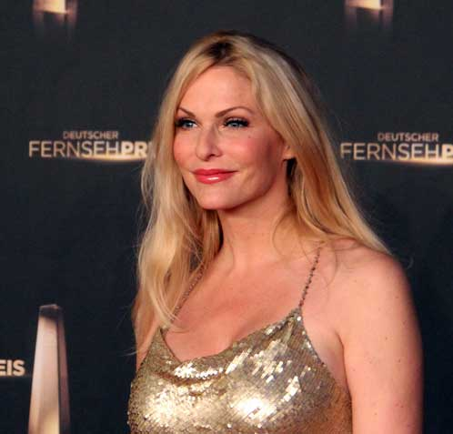 Sonya Kraus beim Deutschen Fernsehpreis 2012